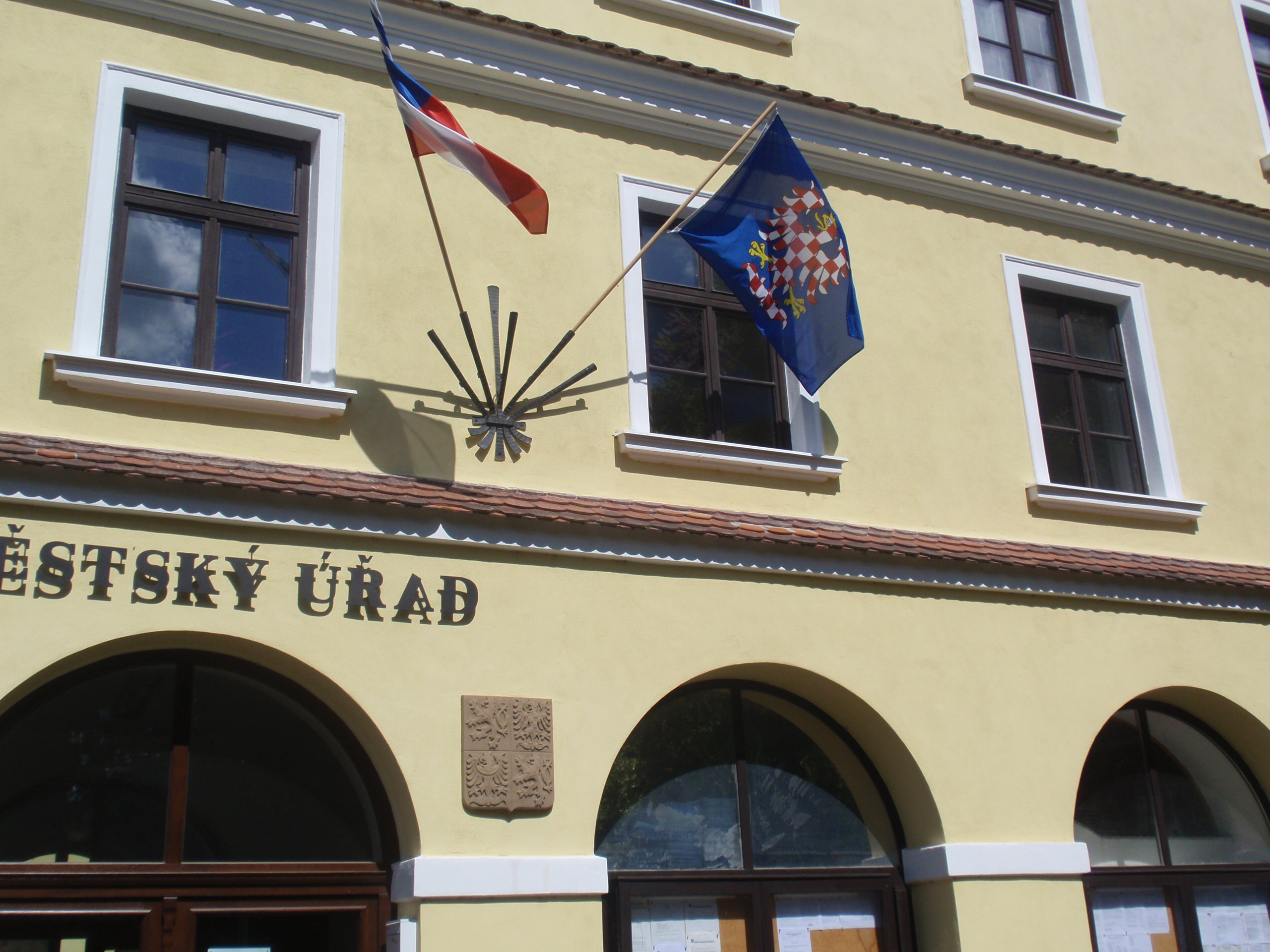 Městský úřad v Moravském Krumlově 4. července 2020 - moravská vlajka vyvěšena společně s vlajkou České republiky